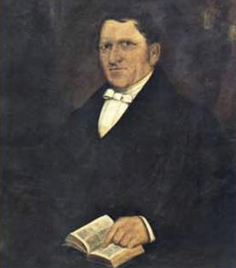 Olieverfschilderij van missionaris David Griffiths, datum vóór 1863